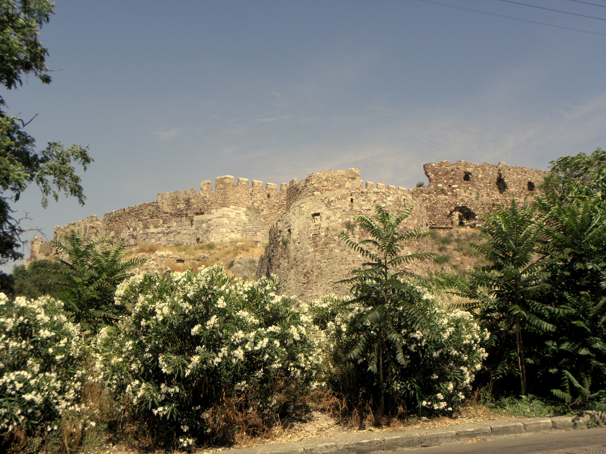 Pevnost v Mytiléně, Lesbos